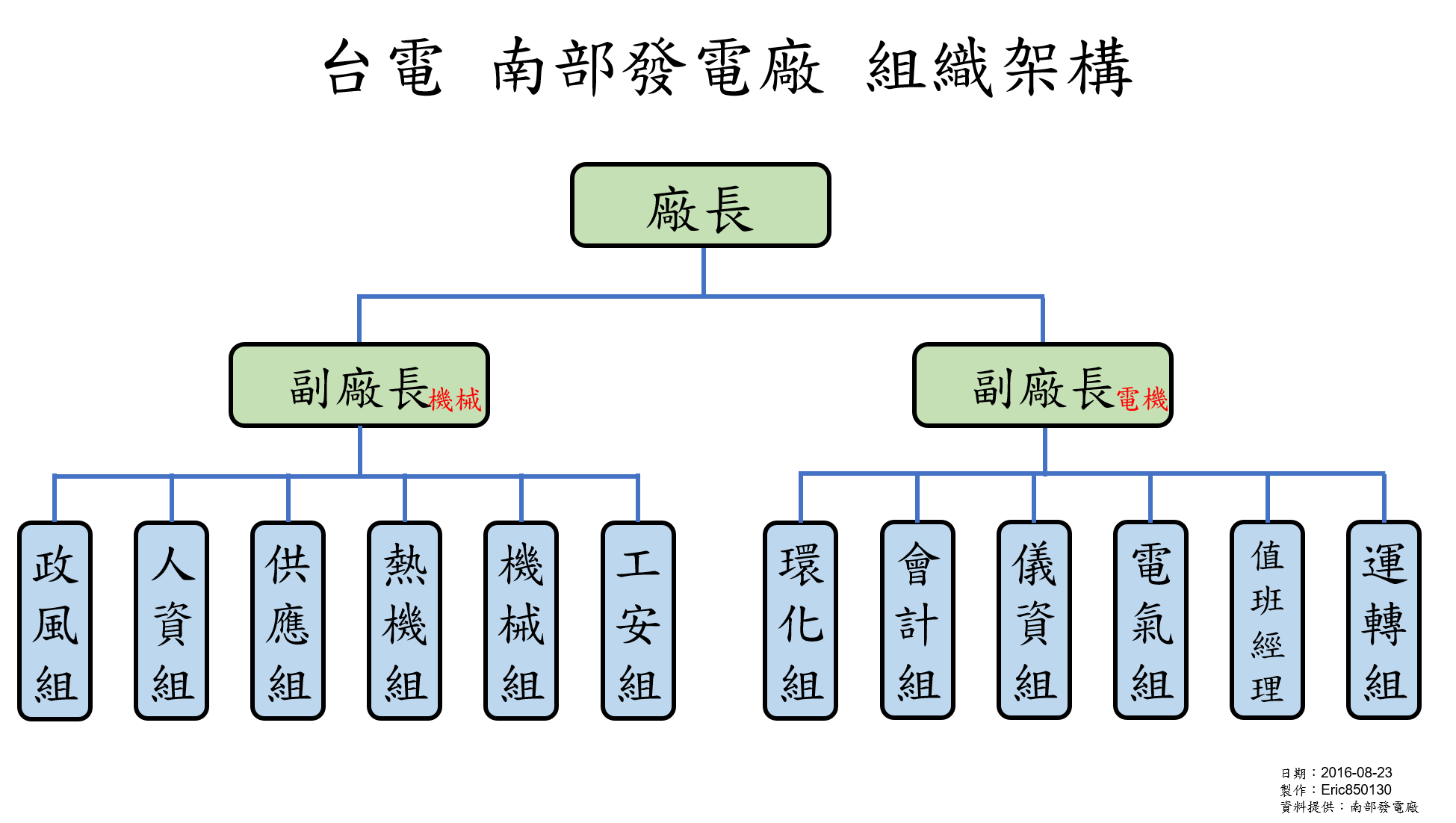 中文（台灣）: 台灣電力公司南部發電廠組織架構。